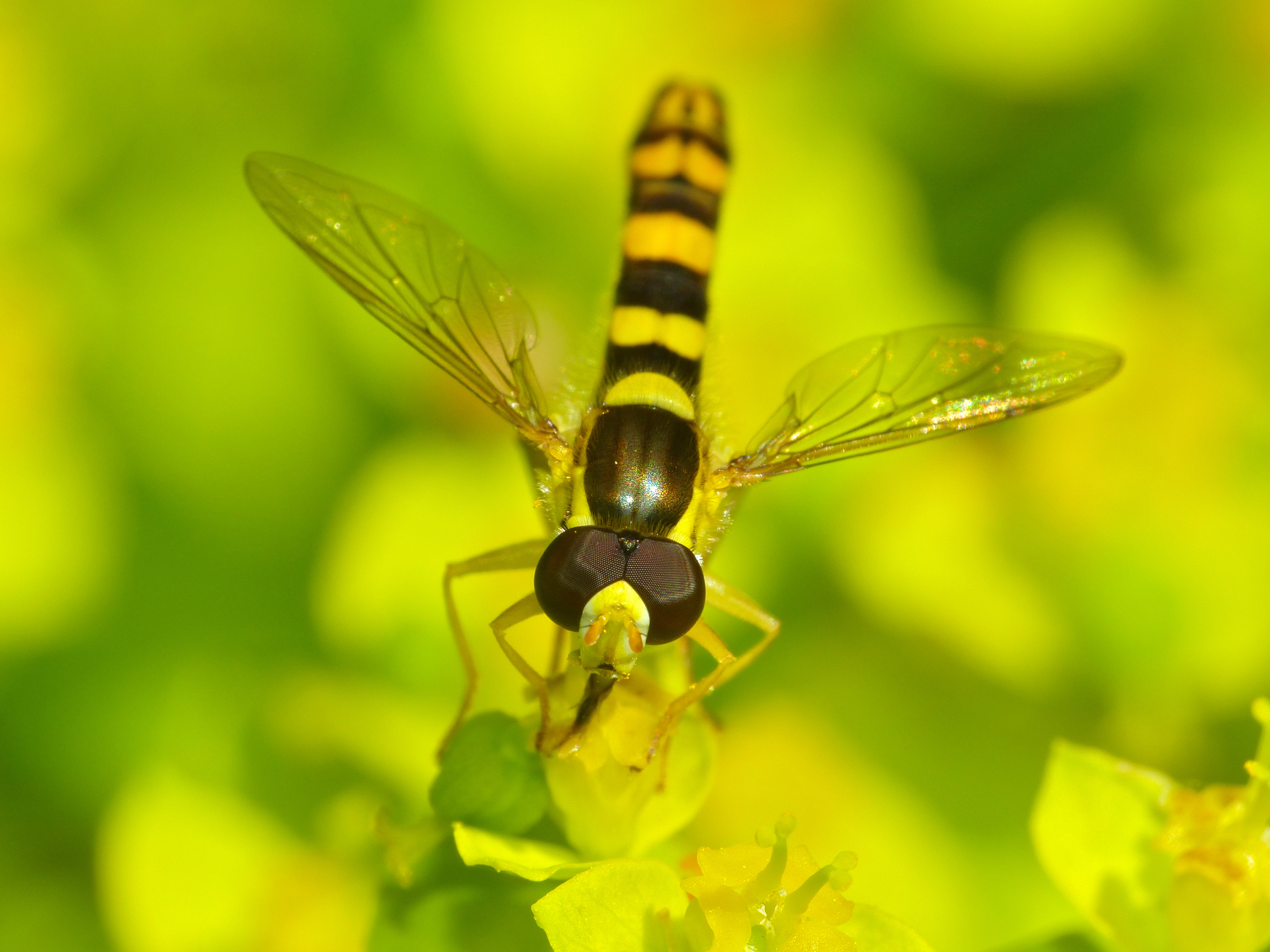 Avène, Hérault, FRANCE